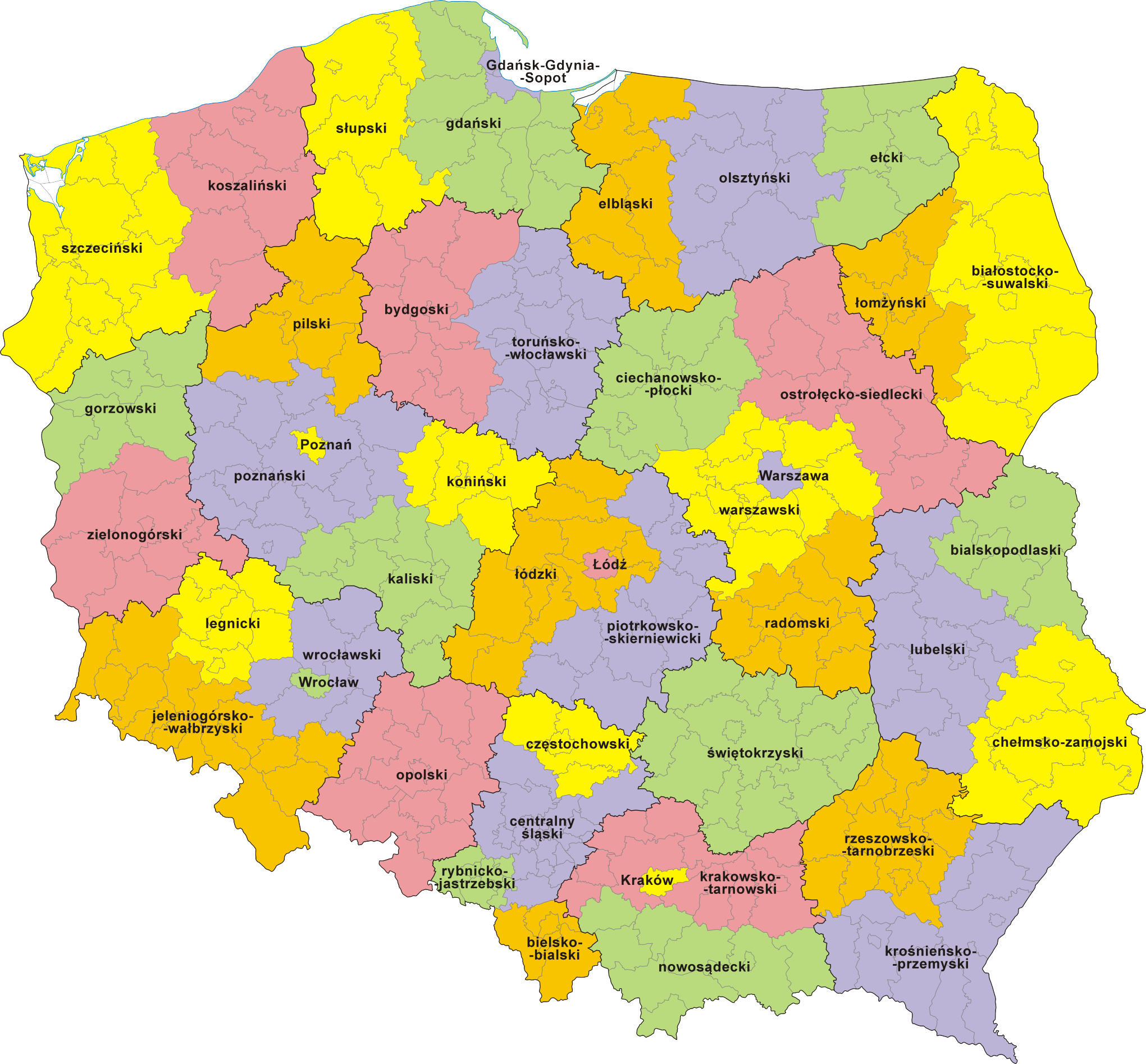 Polska – jednostki NUTS 3 oraz NTS 3 (podregiony) wg podziału obowiązującego od 26 listopada 2005 roku do 31 grudnia 2007 roku dla NUTS oraz od 19 kwietnia 2002 roku do 31 grudnia 2007 roku dla NTS